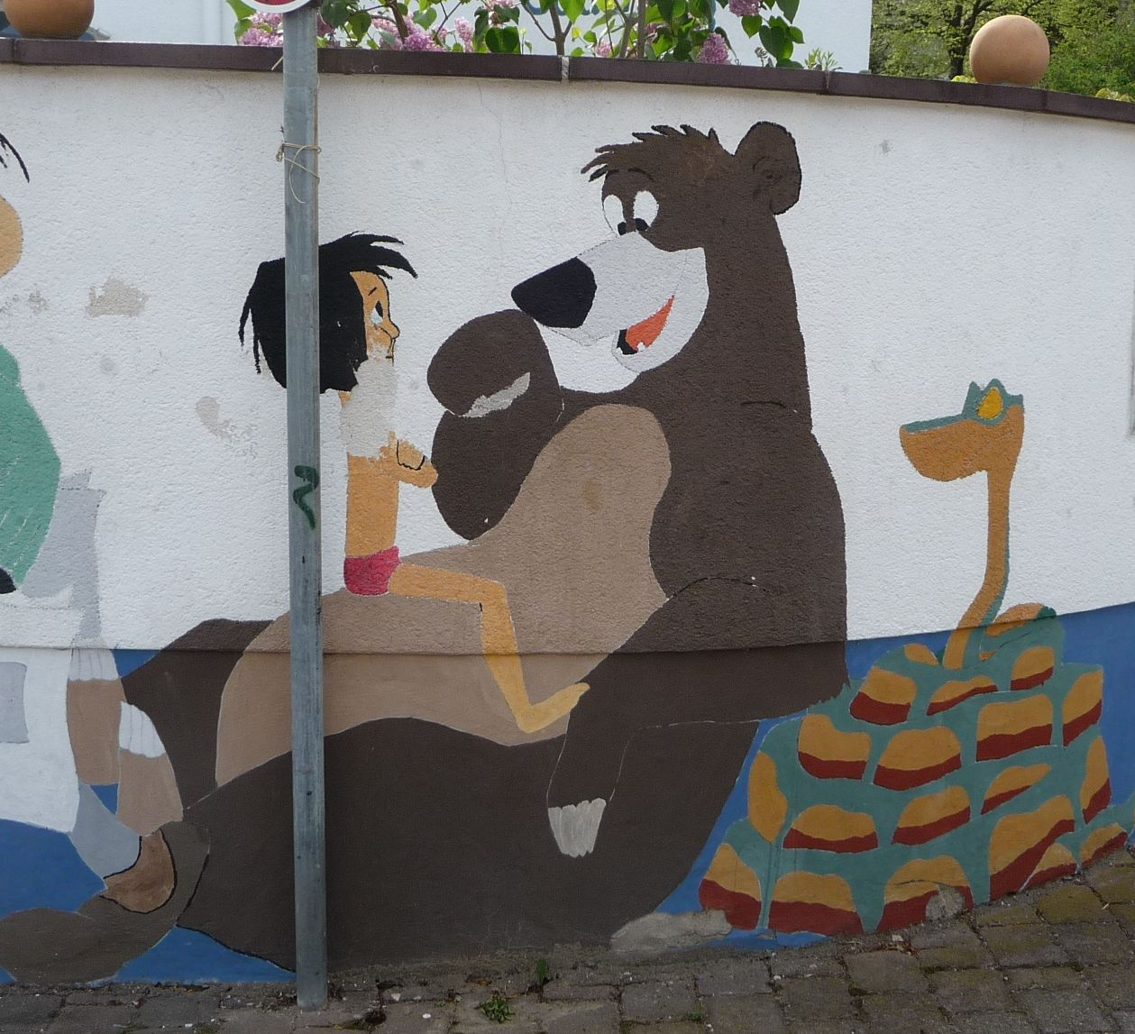 Mogli und Balu